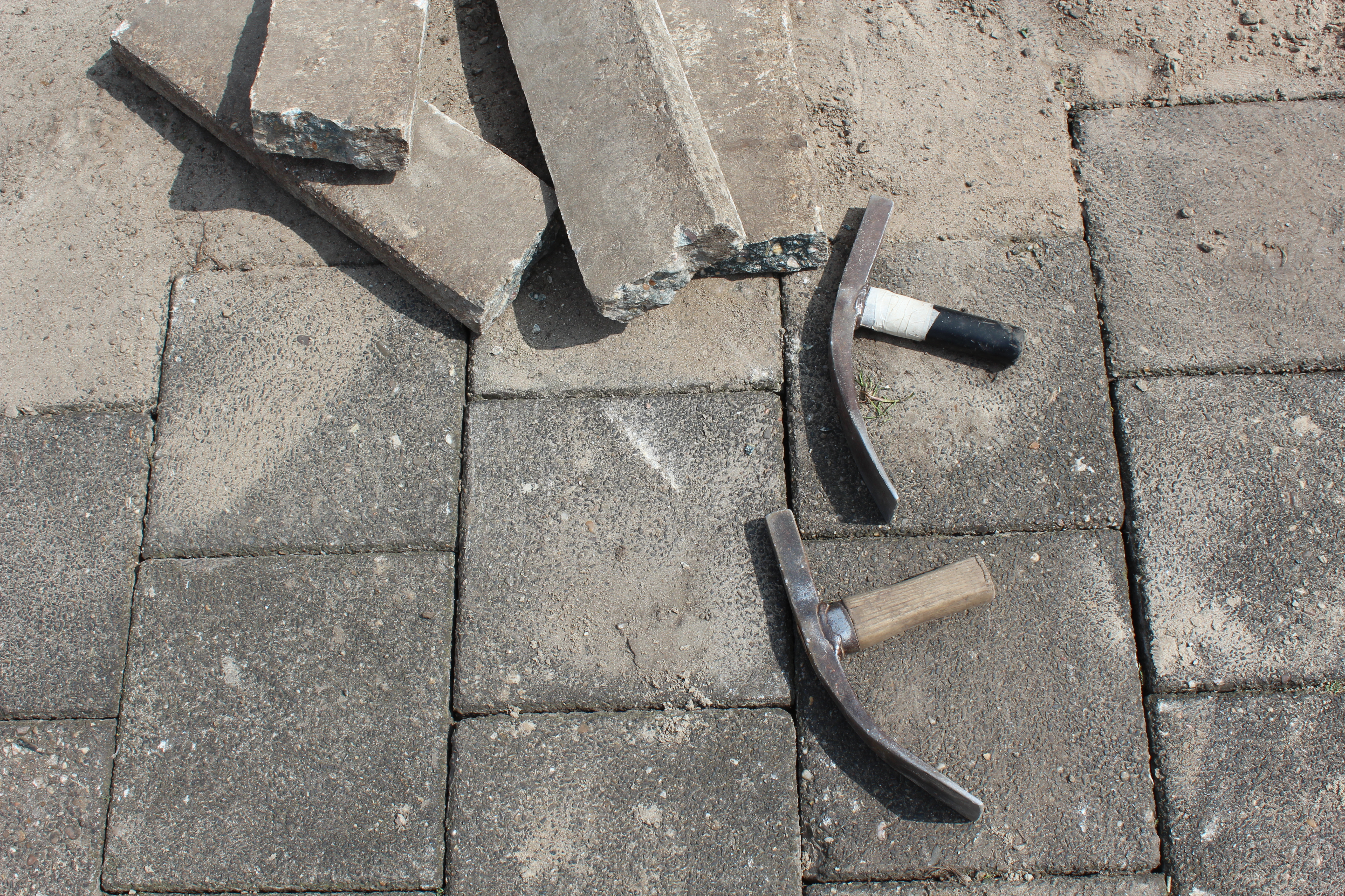 Een stel kaphamers.